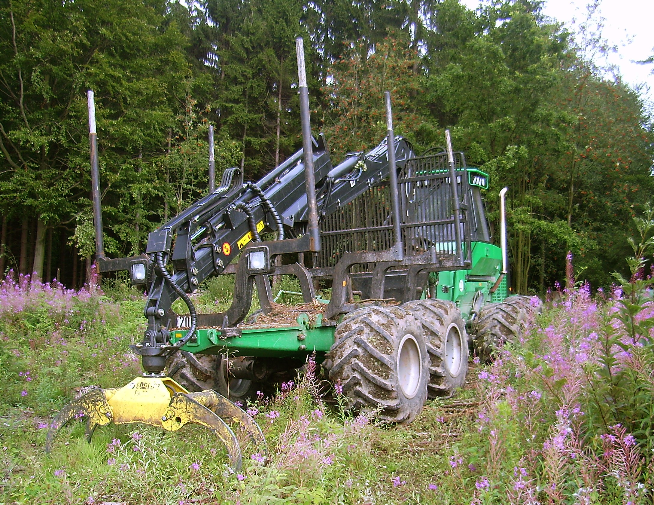 Logset-Forwarder im Solling mit Loglift-Kran 91F